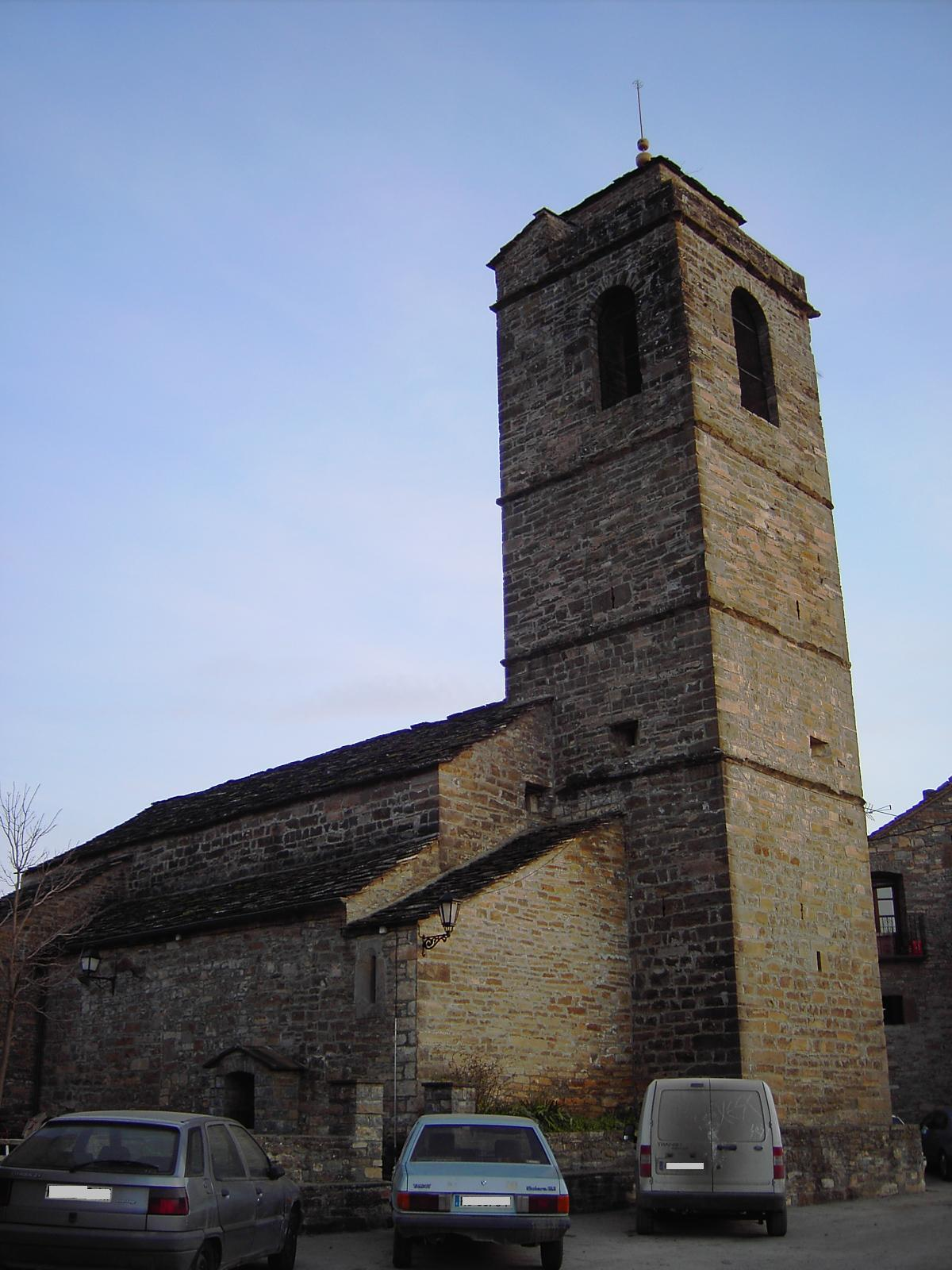 La iglesia de El Pueyo de Araguás, dedicada a la Santa Cruz. Tiene un Esconjuradero en lo alto del campanario.